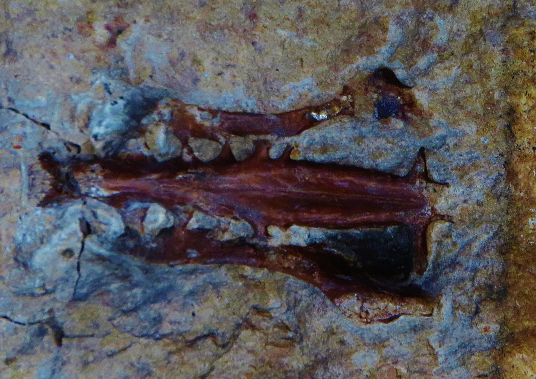 Fossil of Palaeolodus, an extinct bird- Took the photo at Musee d'Histoire Naturelle, Paris